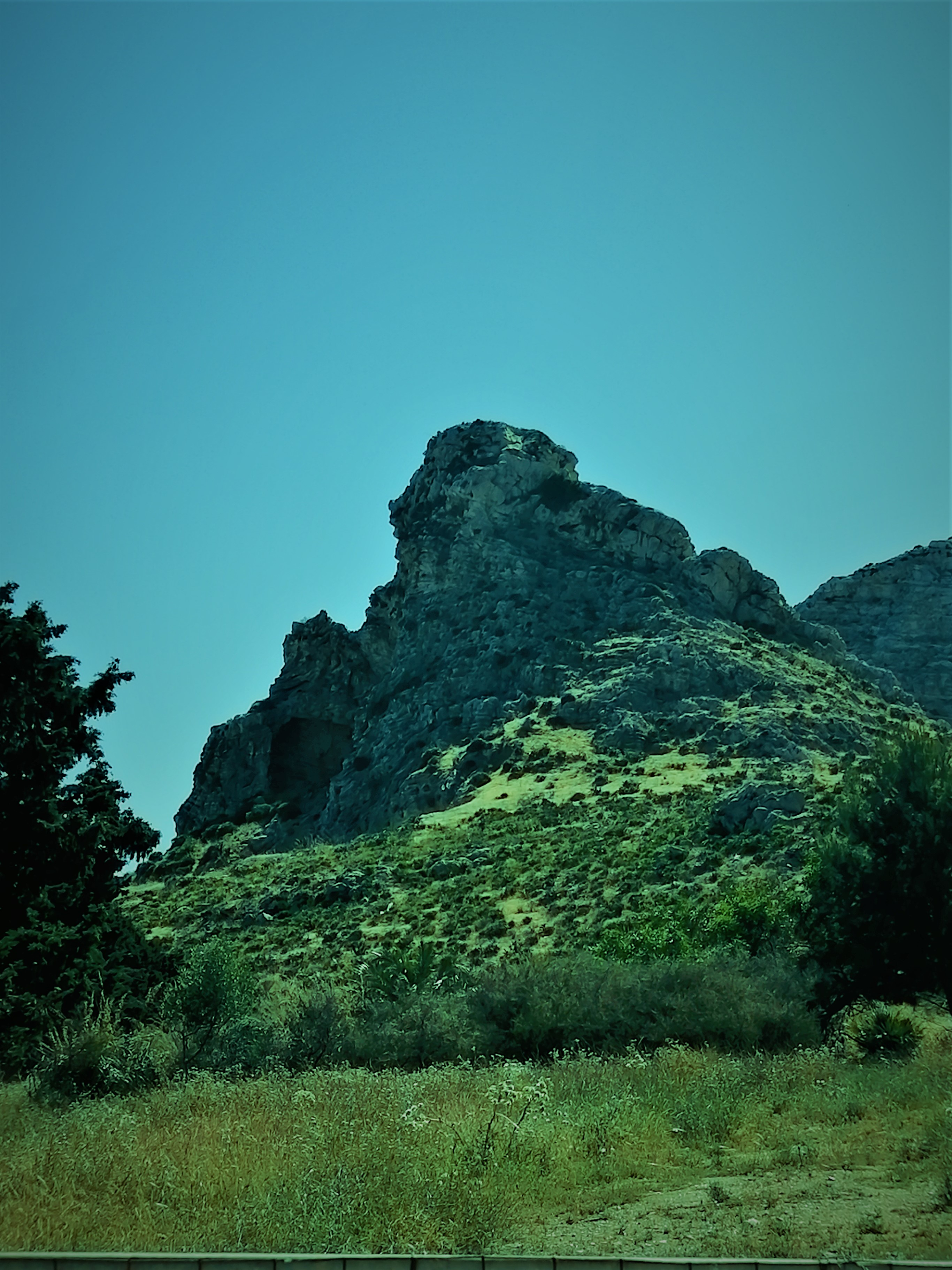 La collinetta Pizzolungo, sul versante settentrionale del Monte Erice, è simbolo dell'omonima frazione.